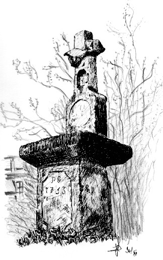 croix en grès blanchâtre - carrefour rue de Stalingrad, rue du Charmois - Raon-L'Étape 88372